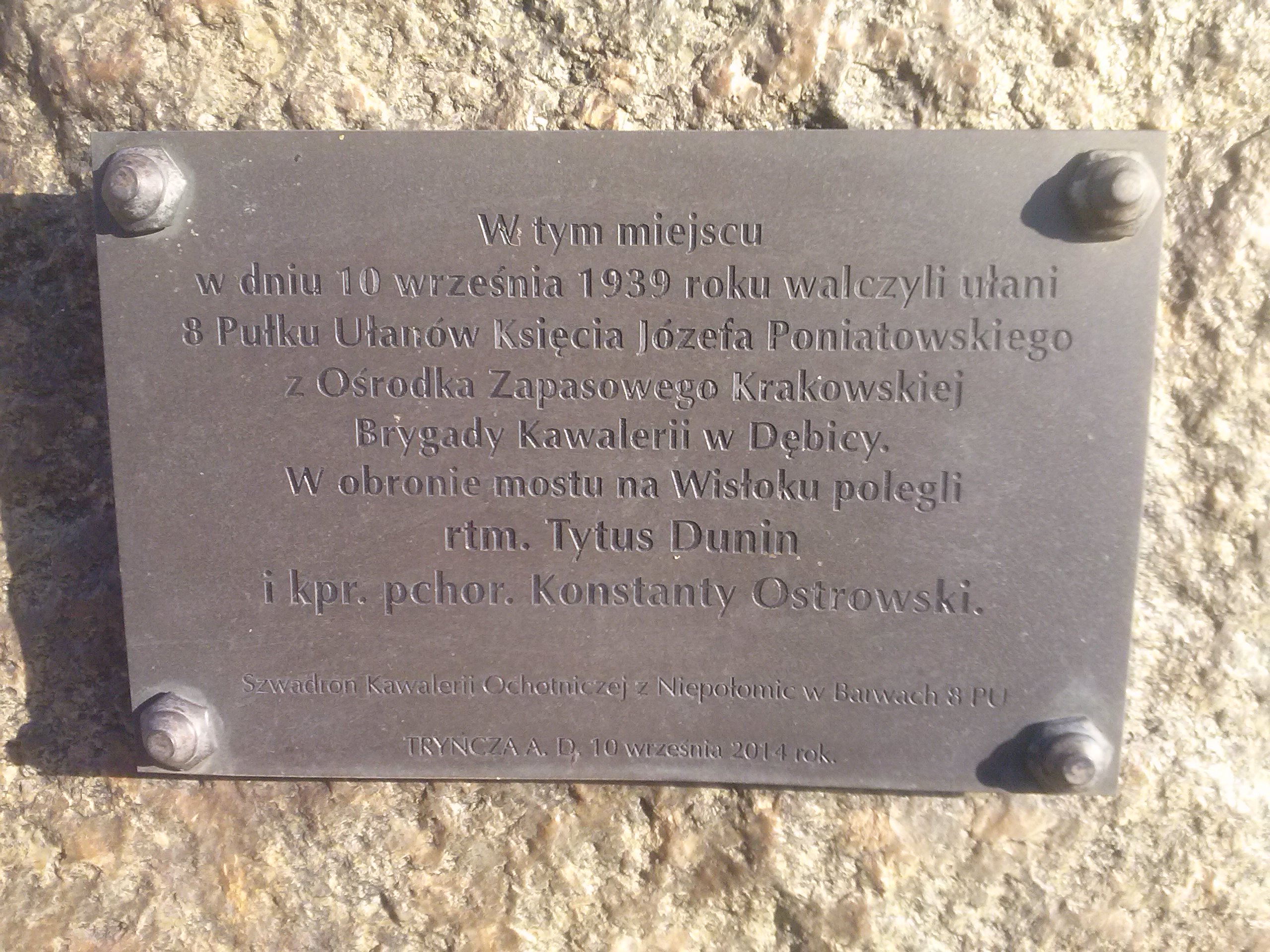 Tabliczka informacyjna na głazie pamięci - rtm. Tytusa Dunina i kpr. pchor. Konstantego Ostrowskiego poległych w obronie mostu w Tryńczy